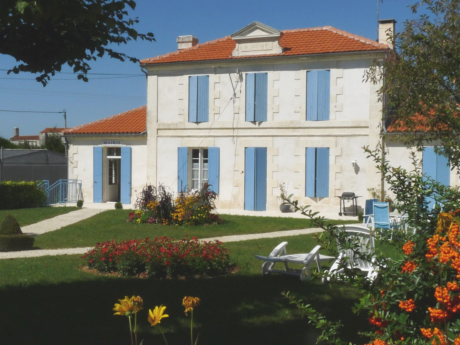 Mairie de Belluire, Charente-Maritime, France